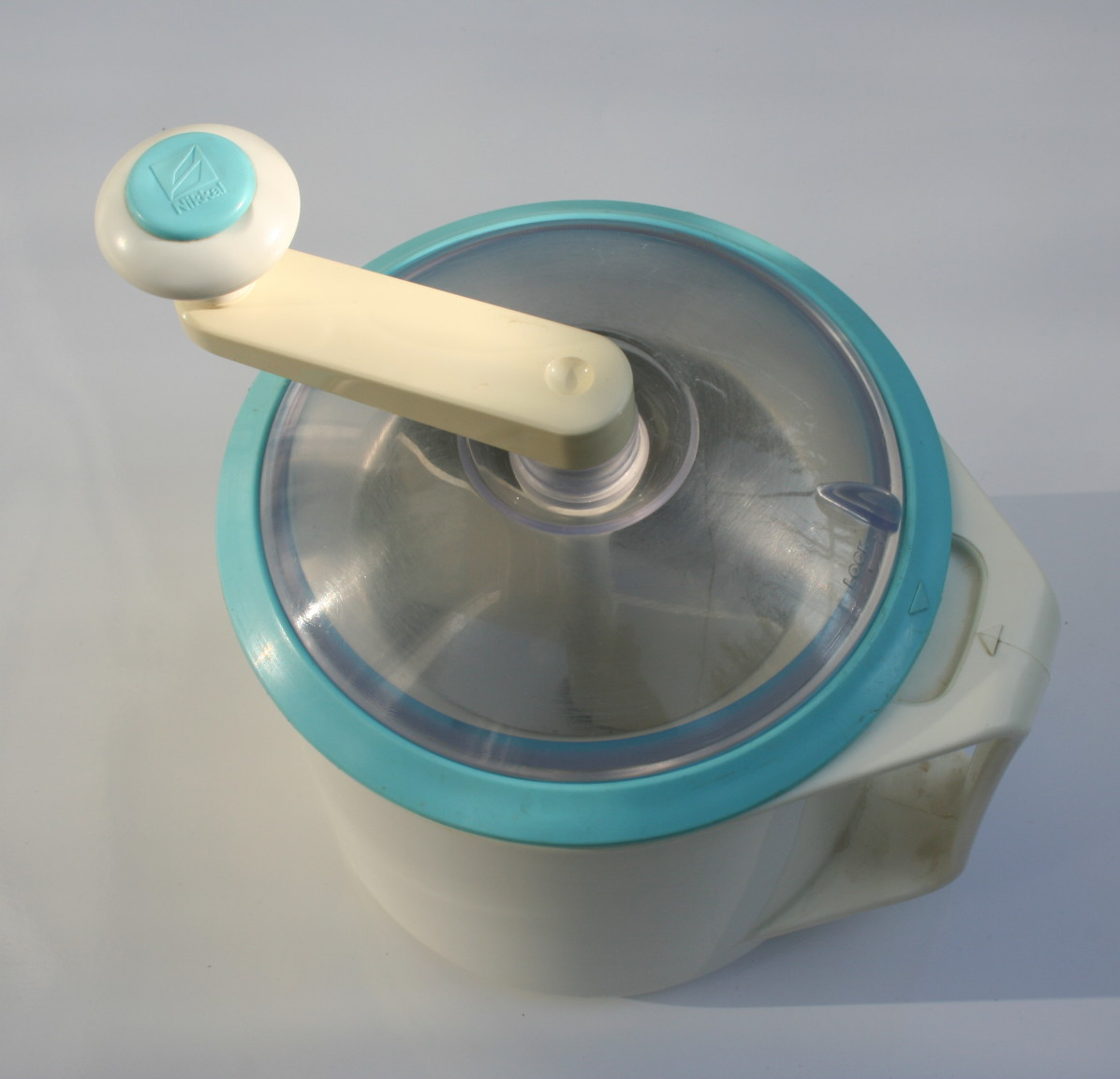 Eismaschine